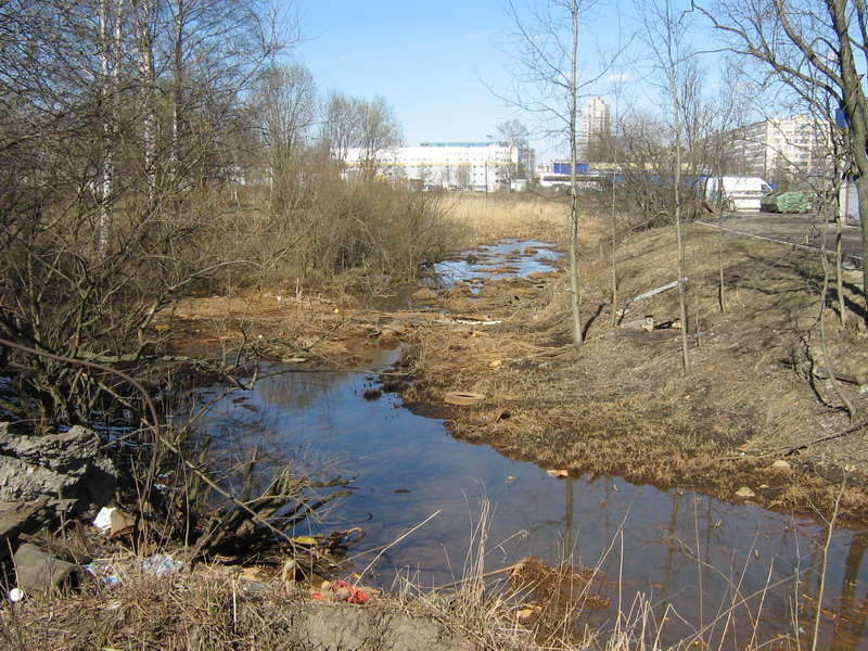 Верховья Чёрной речки